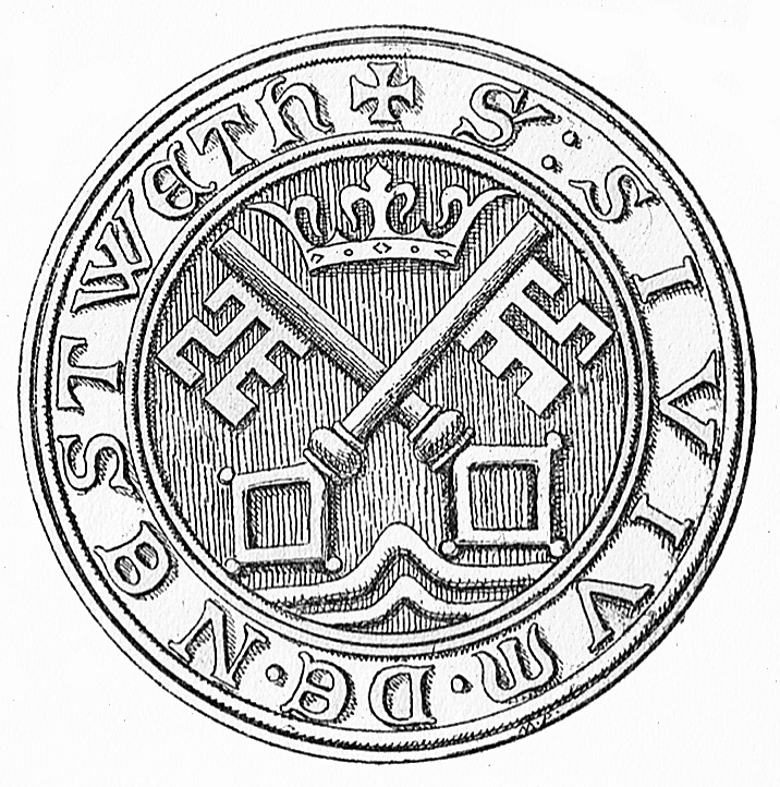 Næstveds købstadssegl